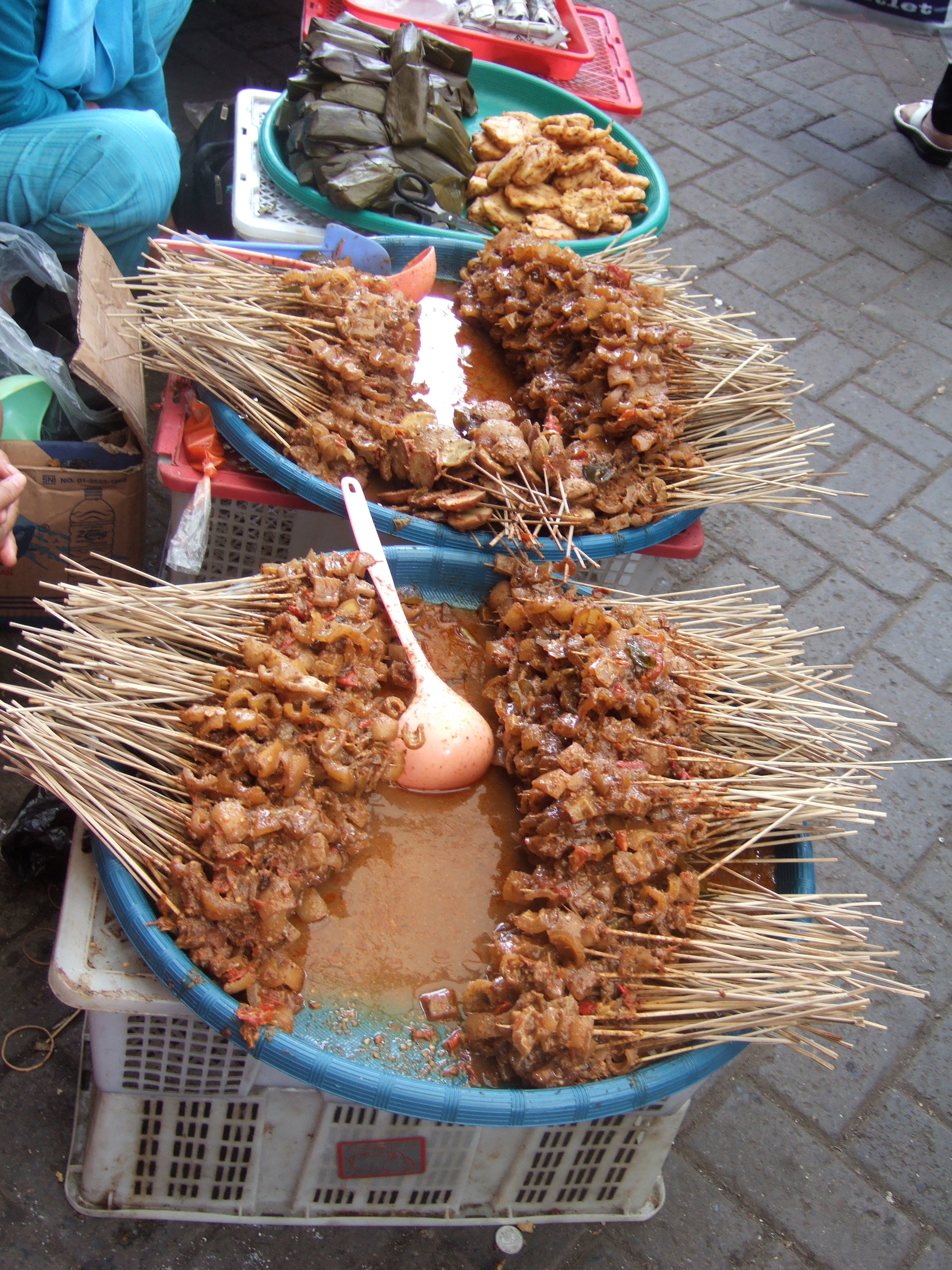 Sate kikil di Pasar Baru, Jakarta